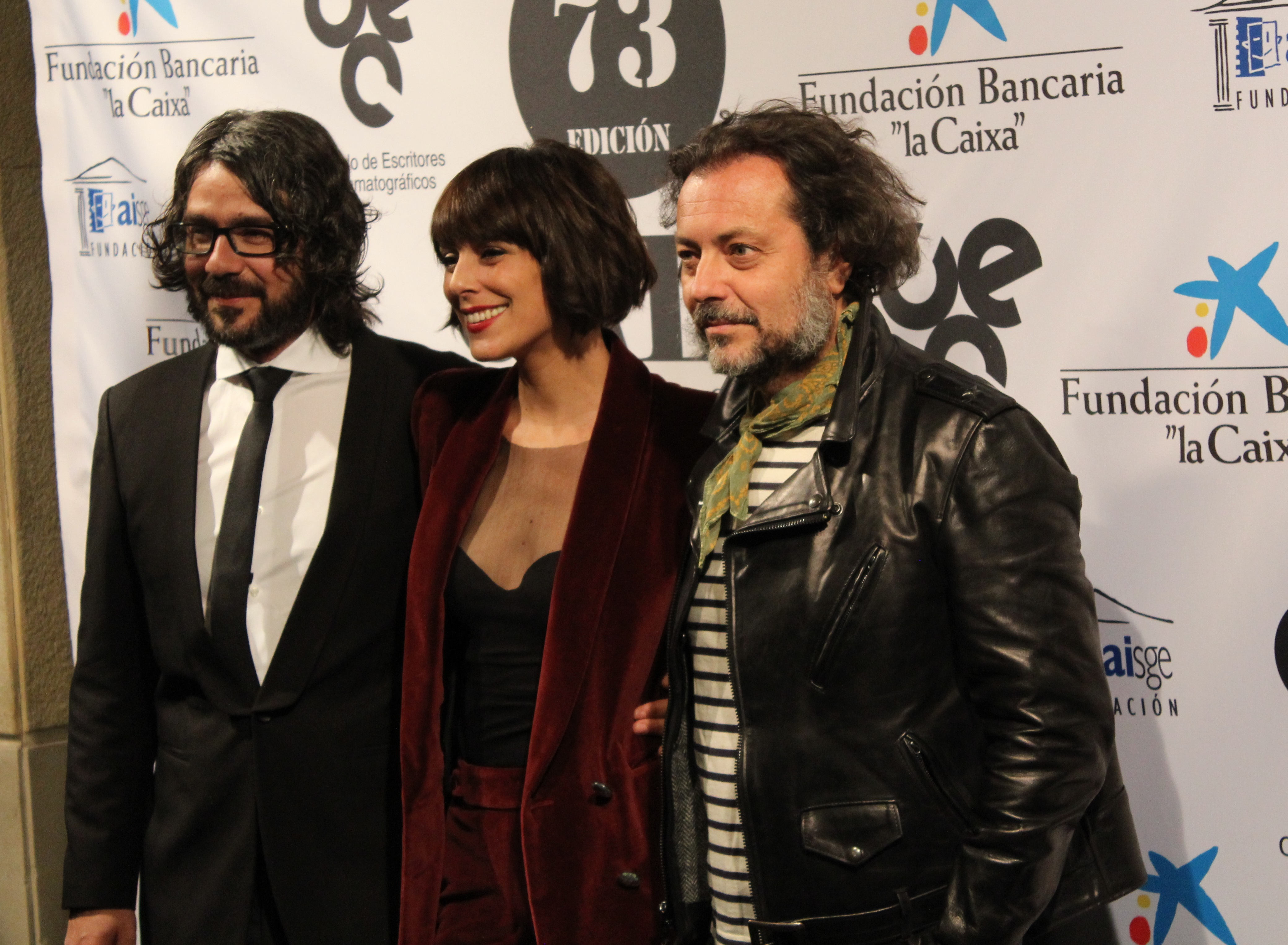 Parte del equipo de la película española La llamada en la 73 edición de las Medallas del Círculo de Escritores Cinematográficos. De izquierda a derecha, el director de fotografía Migue Amoedo, la actriz Belén Cuesta y el productor Enrique López Lavigne.